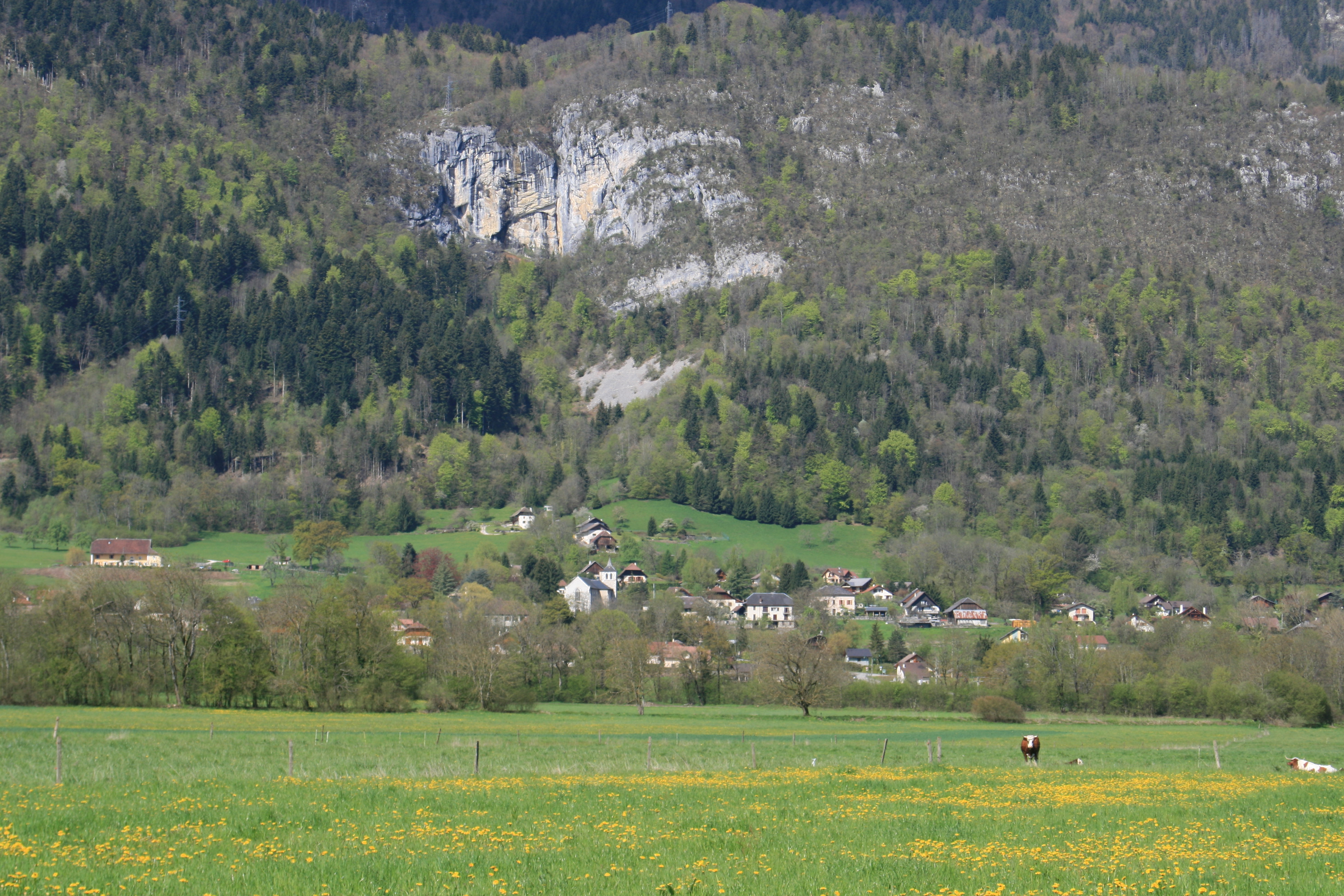 Village de Lathuille vu de la plaine de Doussard